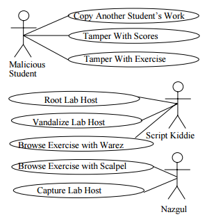 Abuse case example